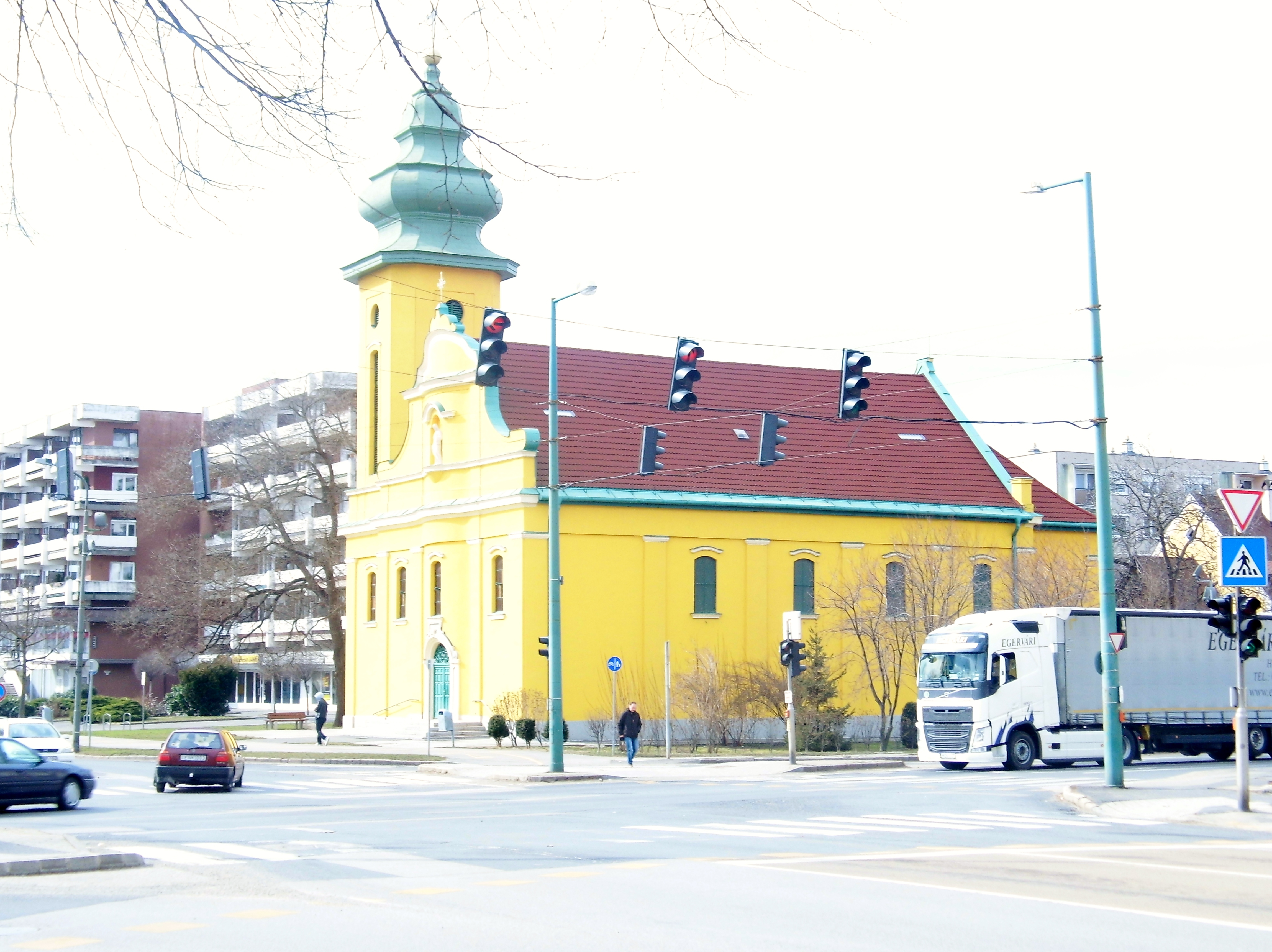 Jézus Szíve-templom, Ajka